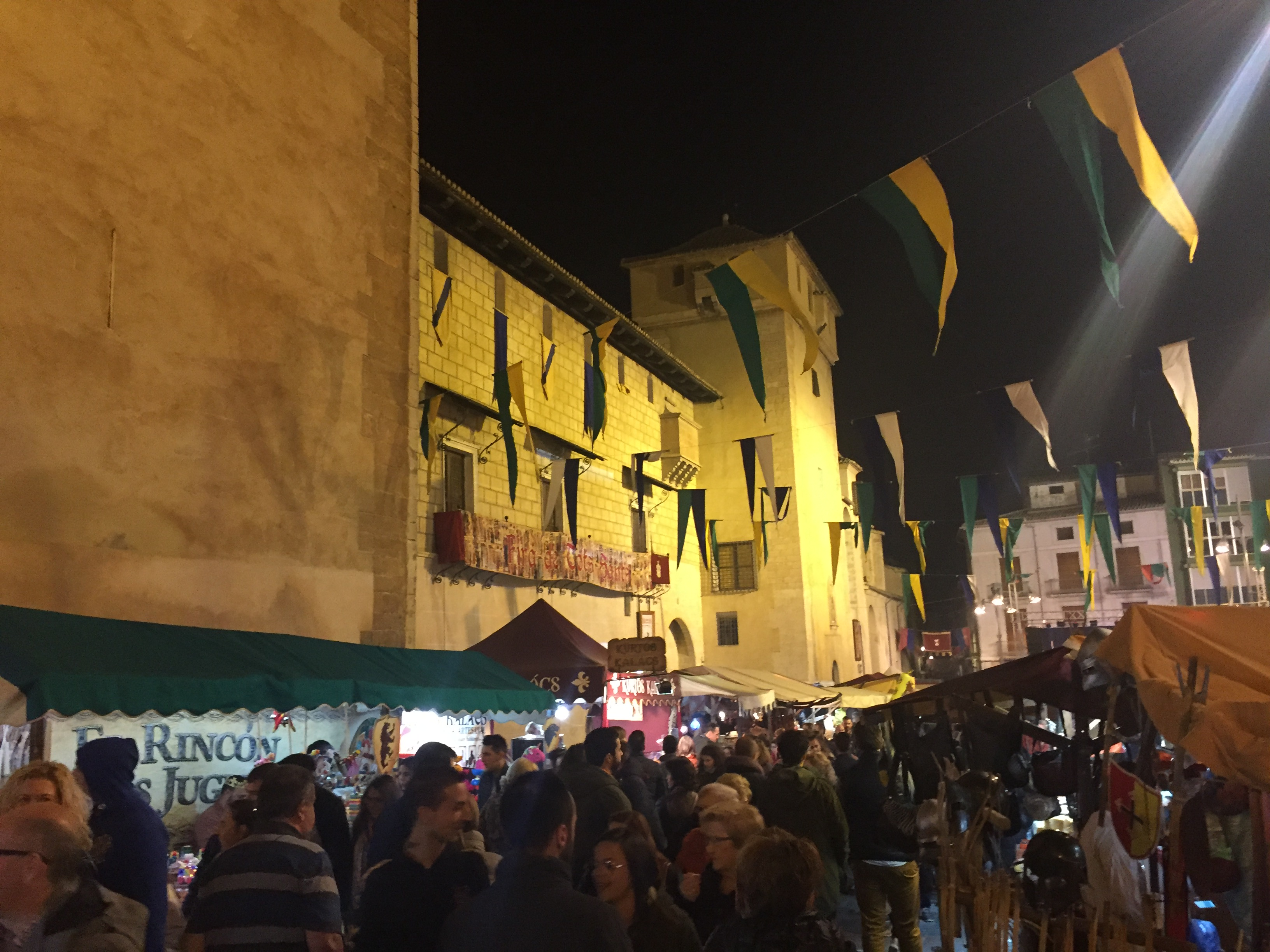 Plaza del Palau durante la Feria de Tots Sants de Cocentaina